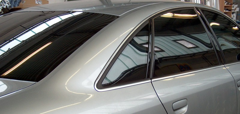 Tönungsfolie verlegt in einem Fahrzeug